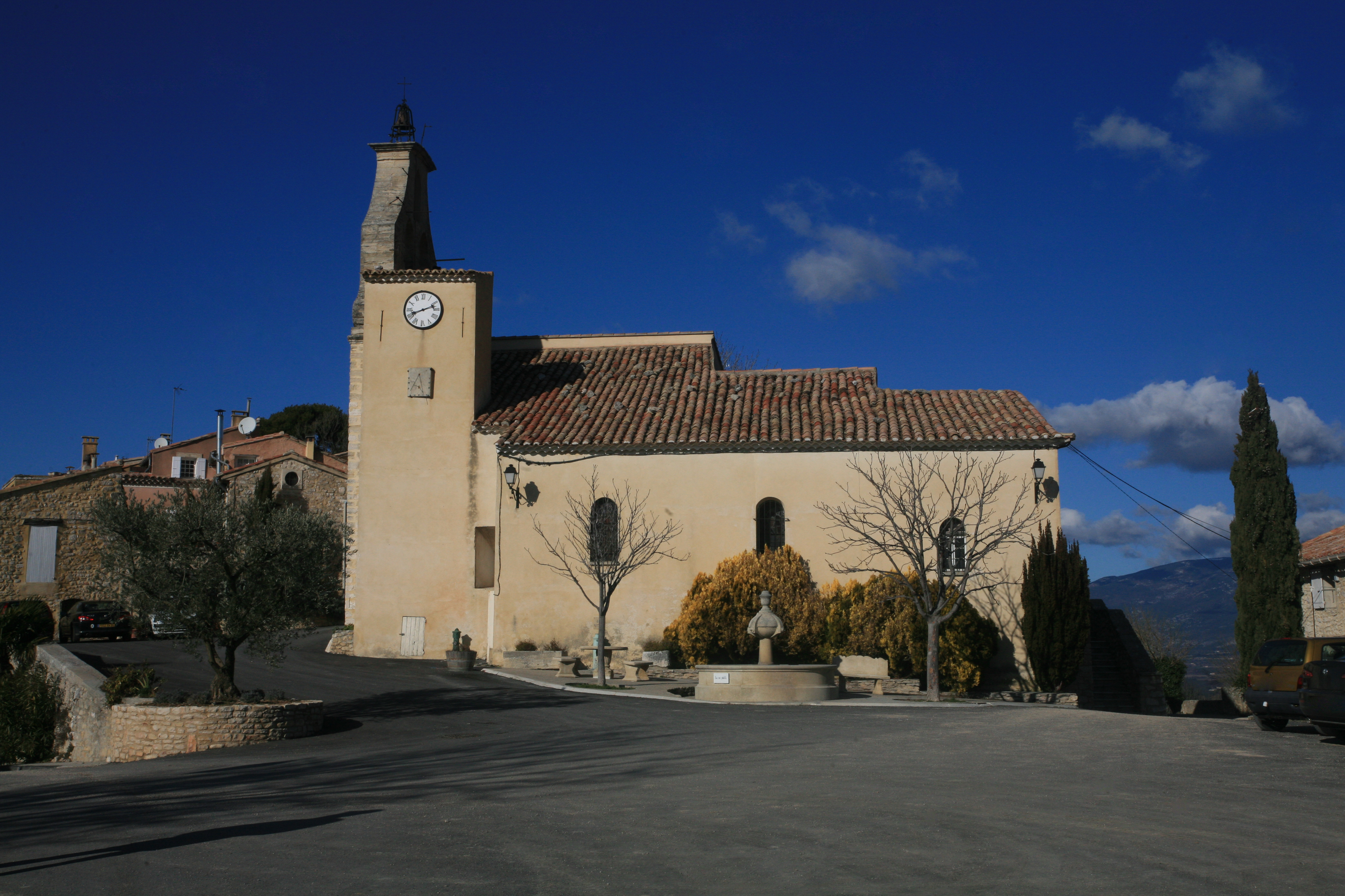 Eglise de Blauvac, France